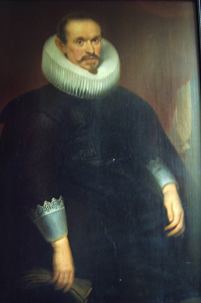 Orendel von Gemmingen. Eigentümer: Dajo von Gemmingen-Hornberg, Archiv Burg Hornberg